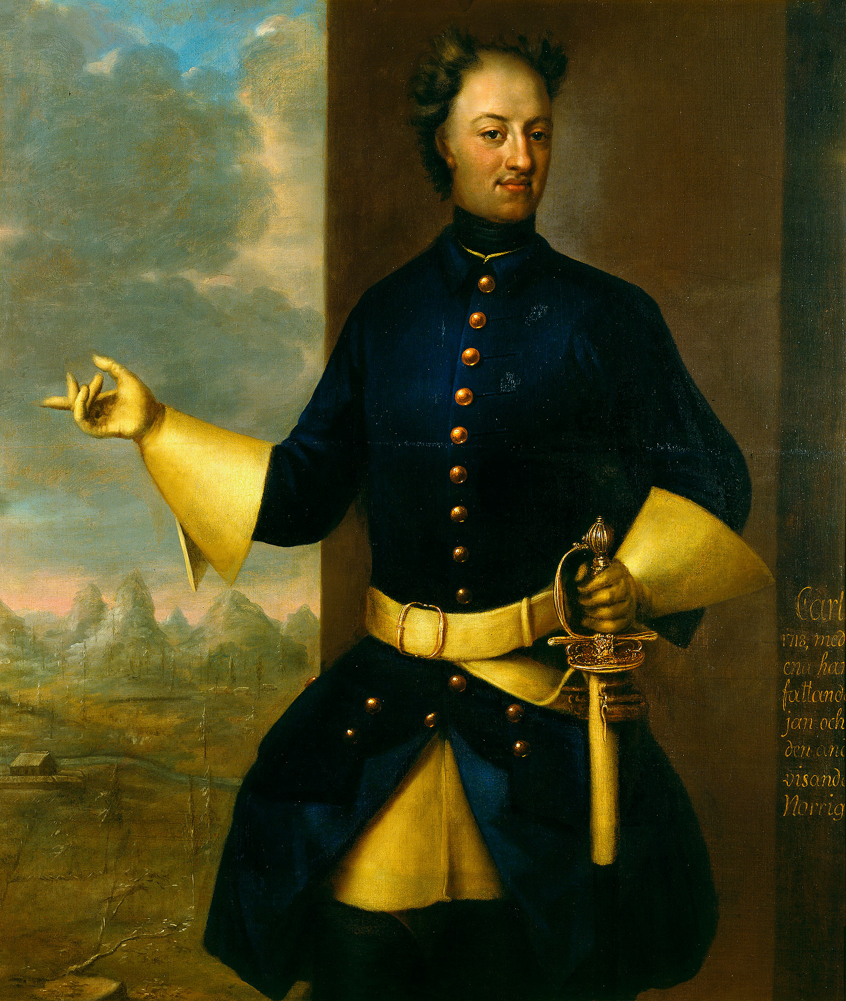 Karl XII i Ystad 1715, målning av Johan Heinrich Wedekindt från 1719